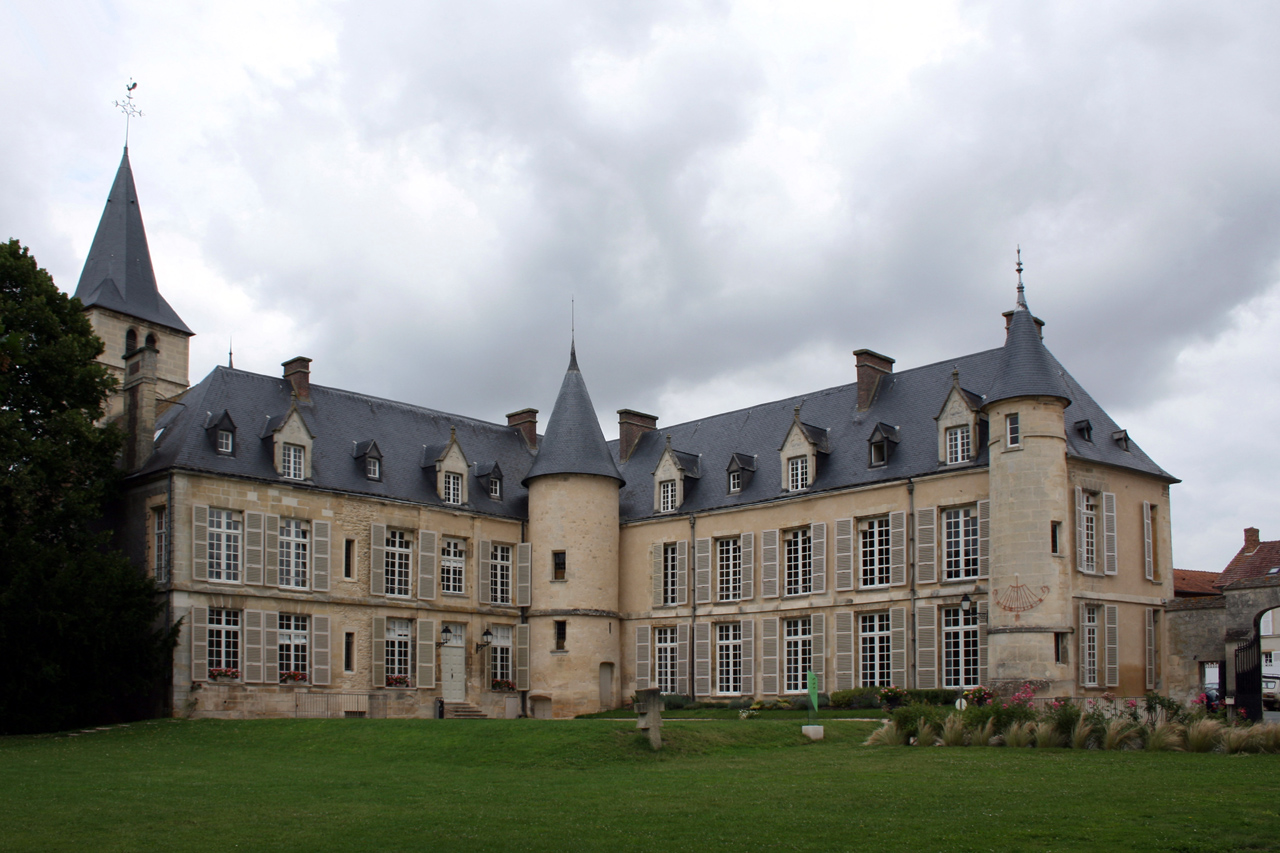 Chateau de Théméricourt